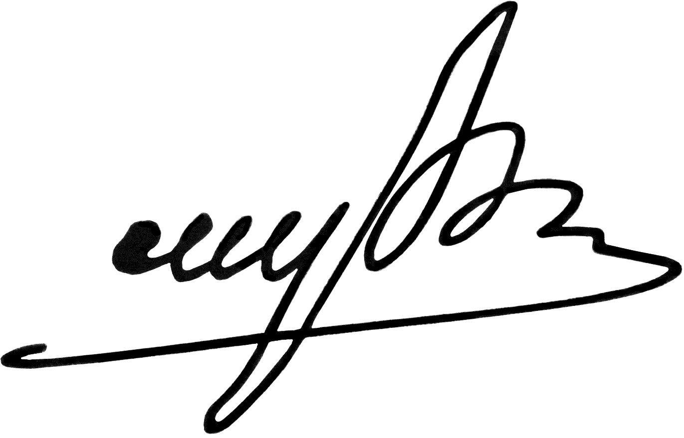 Роспись Председателя Верховной Рады Украины Александра Мороза